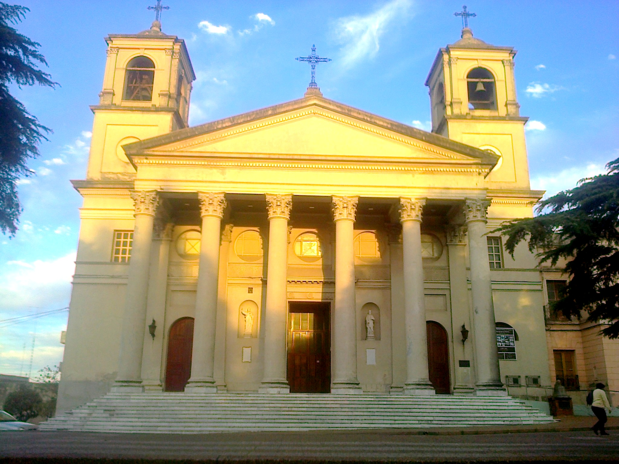 Basílica de Nuestra Señora y San Benito de Palermo con su equipamiento.. Ubicada en el departamento de Paysandú